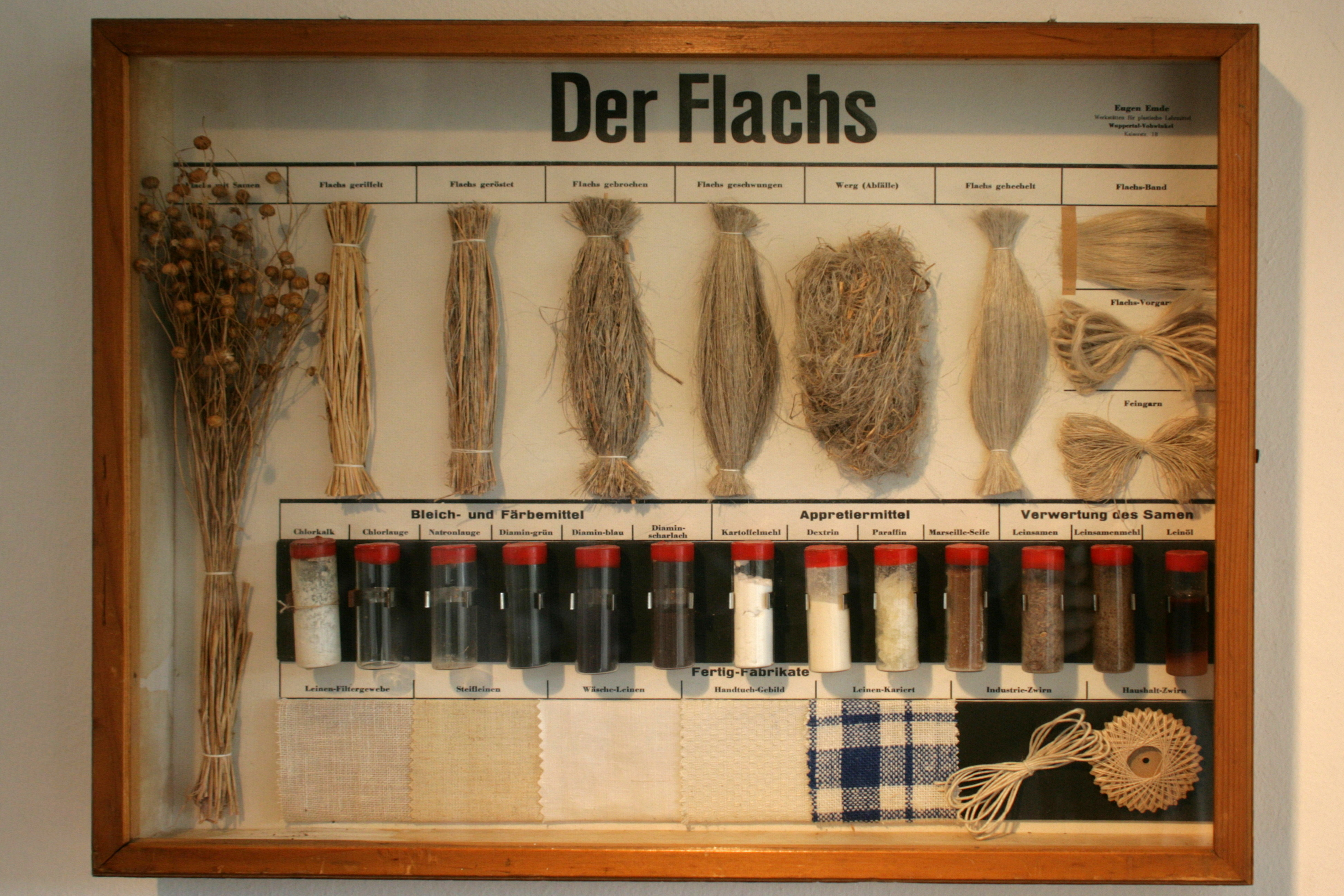 Bergisches Museum für Bergbau, Handwerk und Gewerbe, Burggraben 9-21 in Bergisch Gladbach